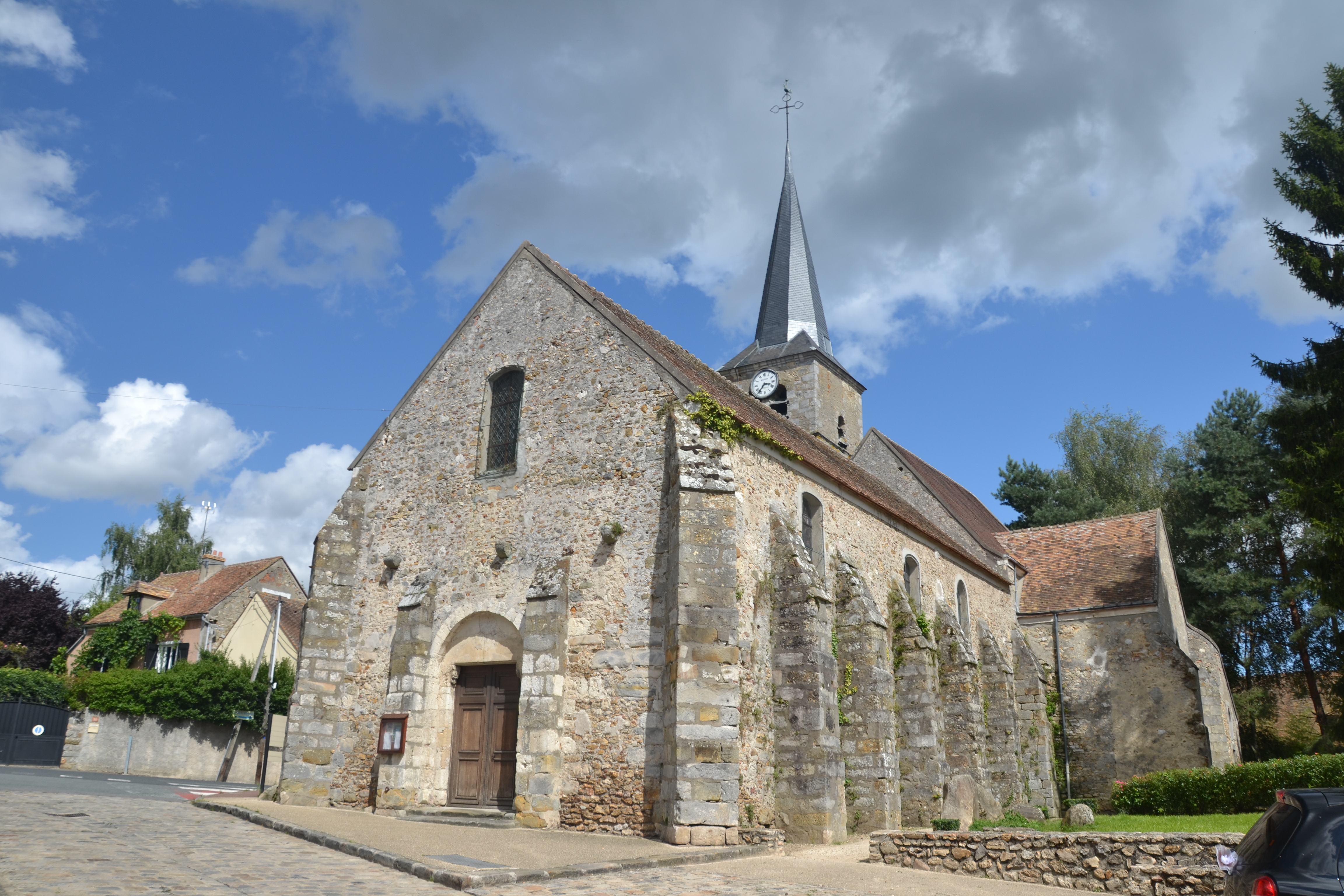 église d'Angervilliers